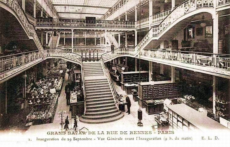 Grand Bazar (ou Magasins Réunis) de la Rue de Rennes à Paris, datant de l'inauguration du 29 septembre 1907